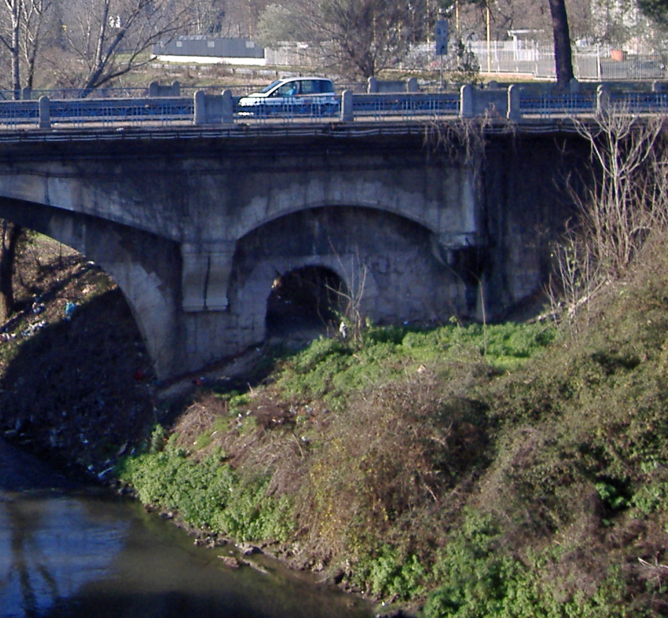 Roma, ponte Salario. A destra uno degli archi romani conservati sotto il ponte moderno.